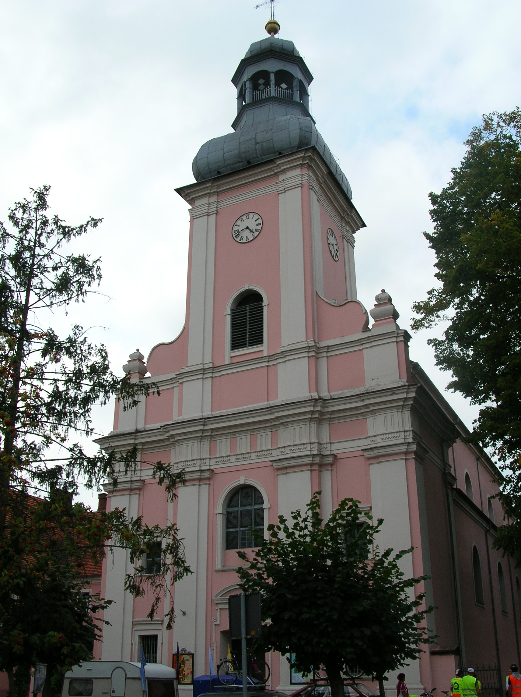 closter at Grabów nad Prosną